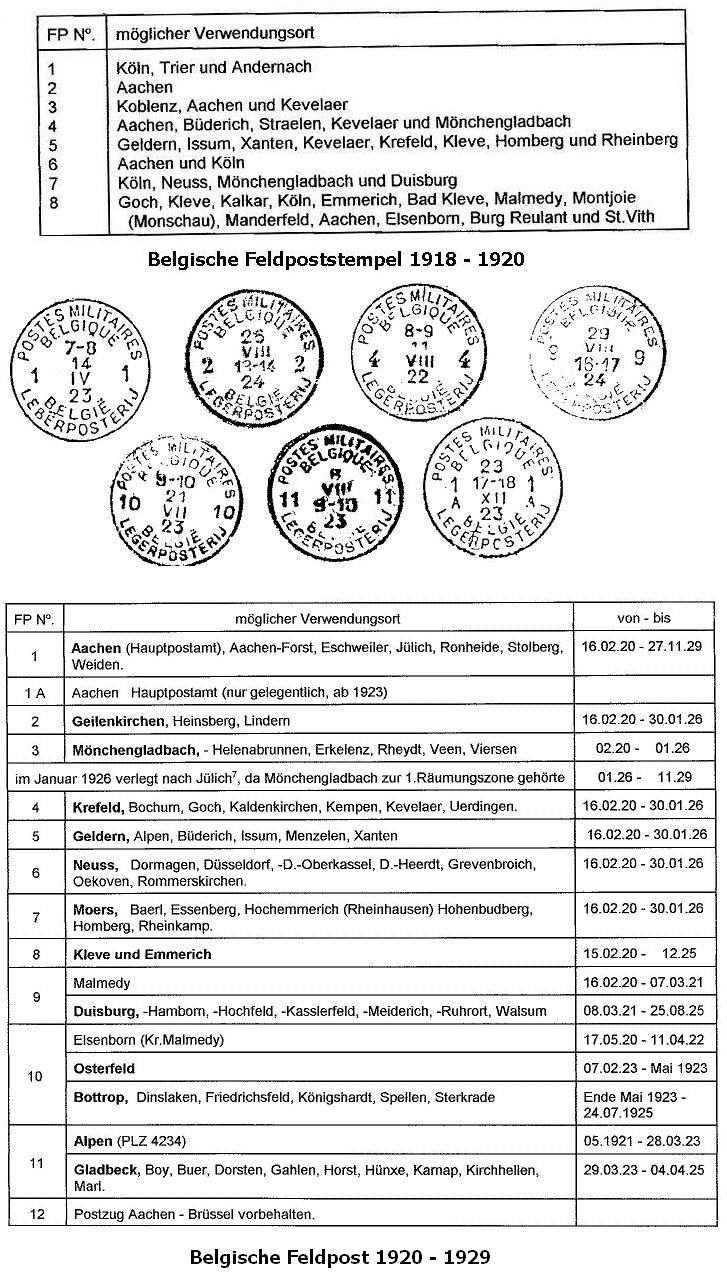 Belgische Feldpostämter und Stempel 1918 - 1929 Eigenbau W.Steven 16:54, 23. Jan. 2007 (CET) 2007